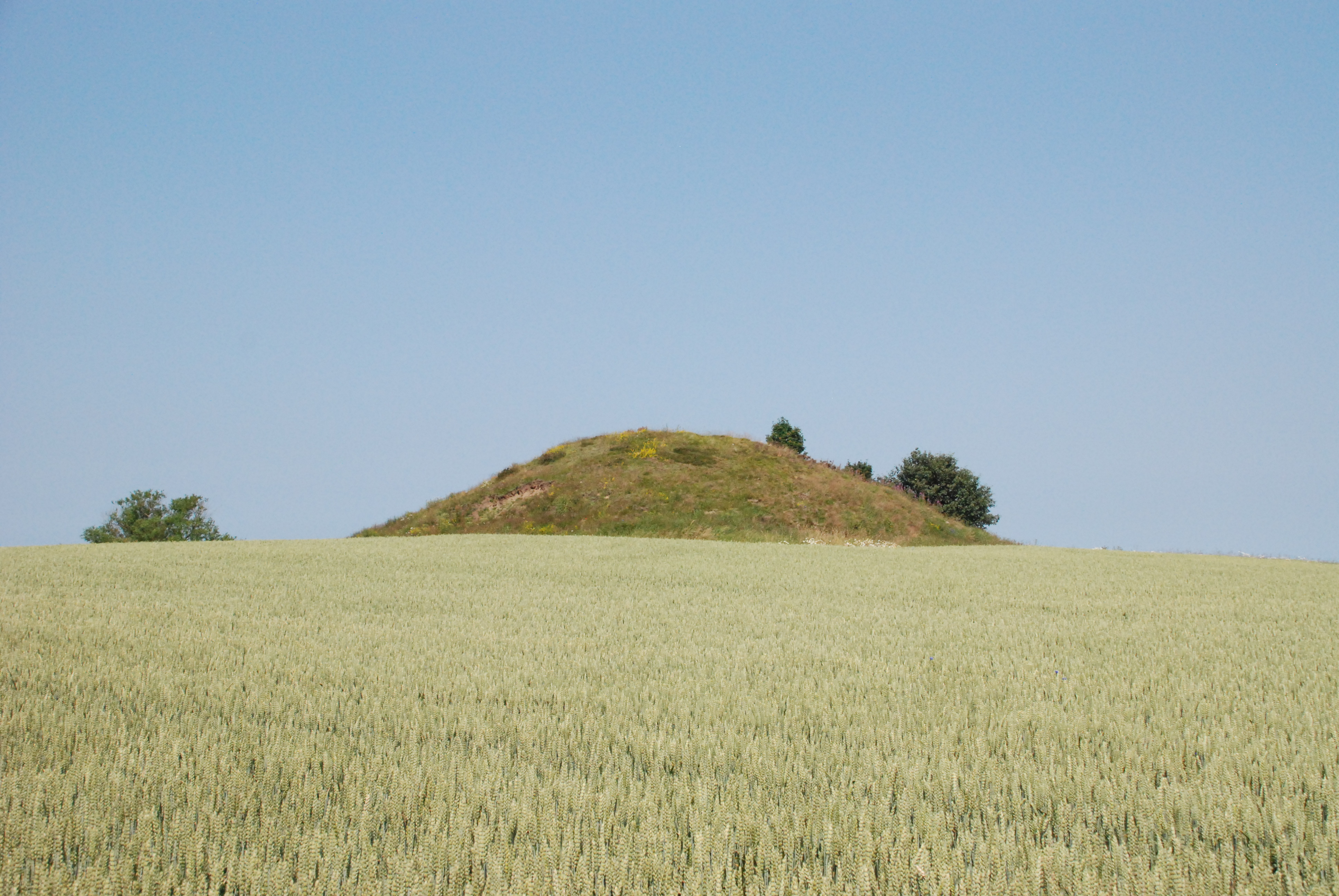 Gravhøjen Hyrdehøj, Ramløse Sogn, Holbo Herred, Frederiksborg Amt, Danmark, fotograferet fra omkring sydsydøst.